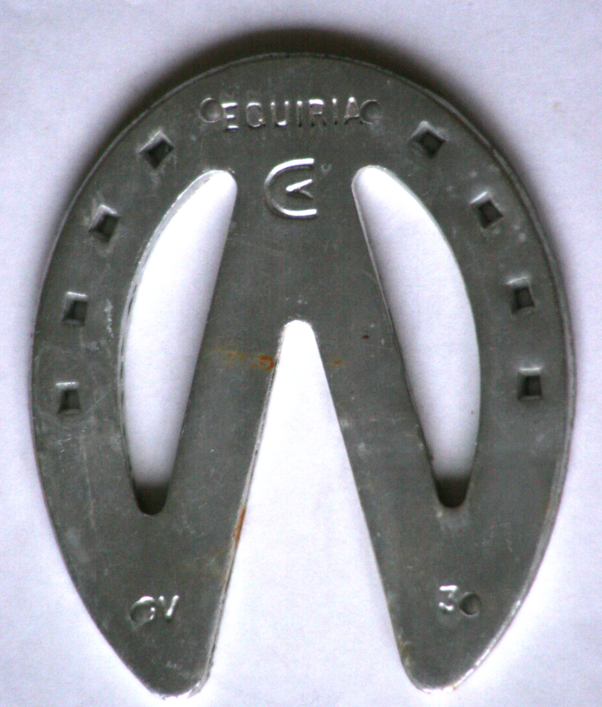 Spezialhufeisen Stegeisen